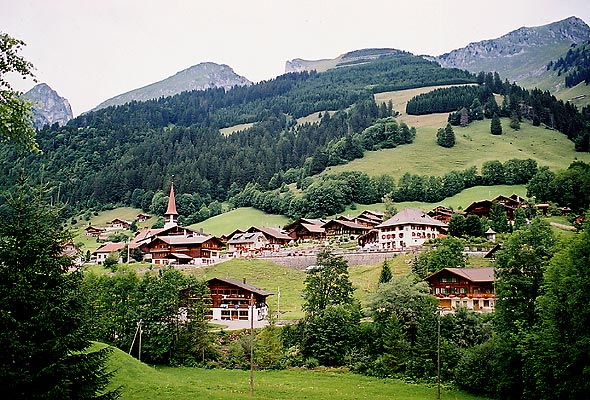 Blick auf Jaun